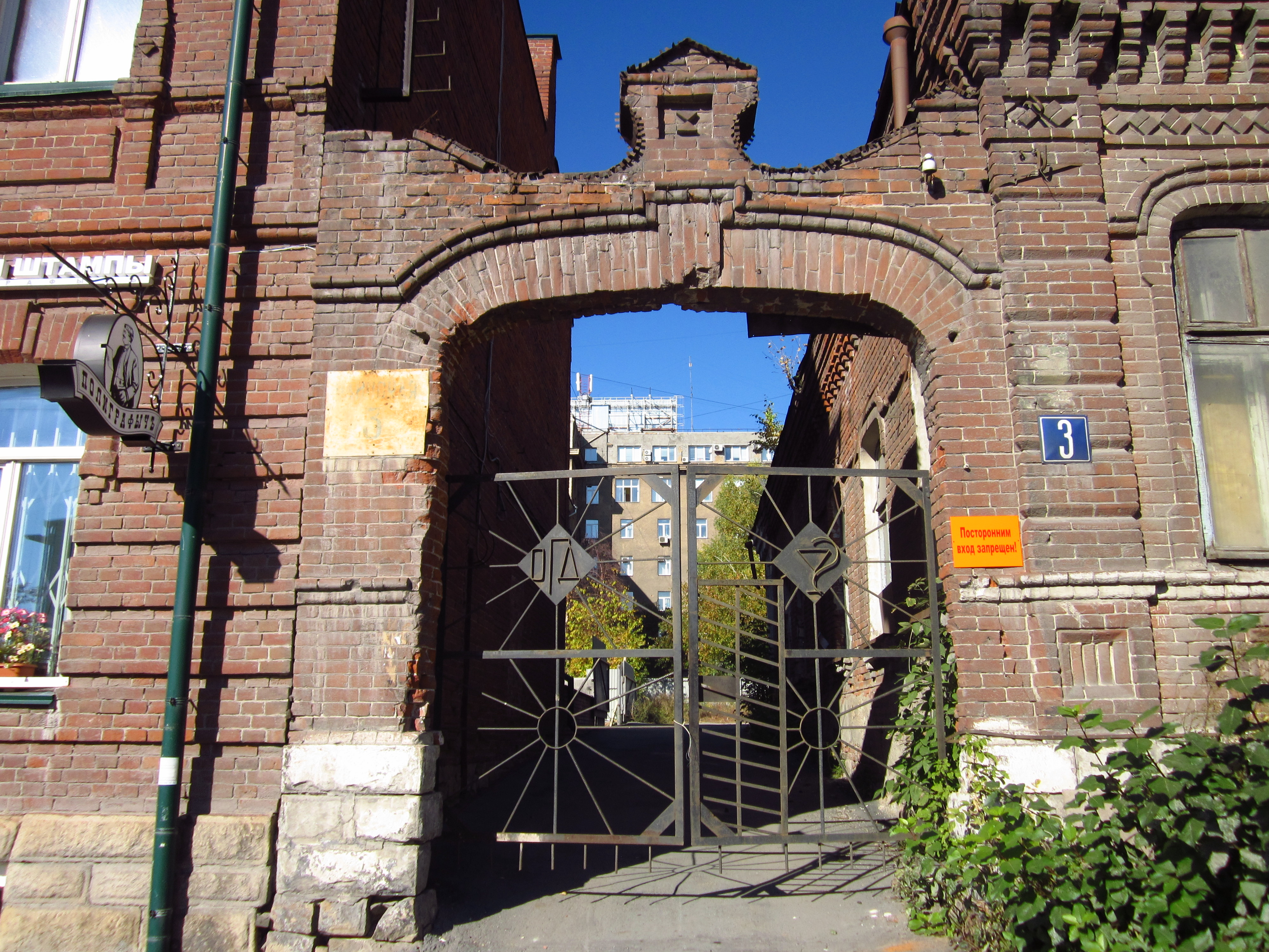 Ворота усадьбы Е.К. Шаап ул. Каинская, 3. Построены в 1915 г.